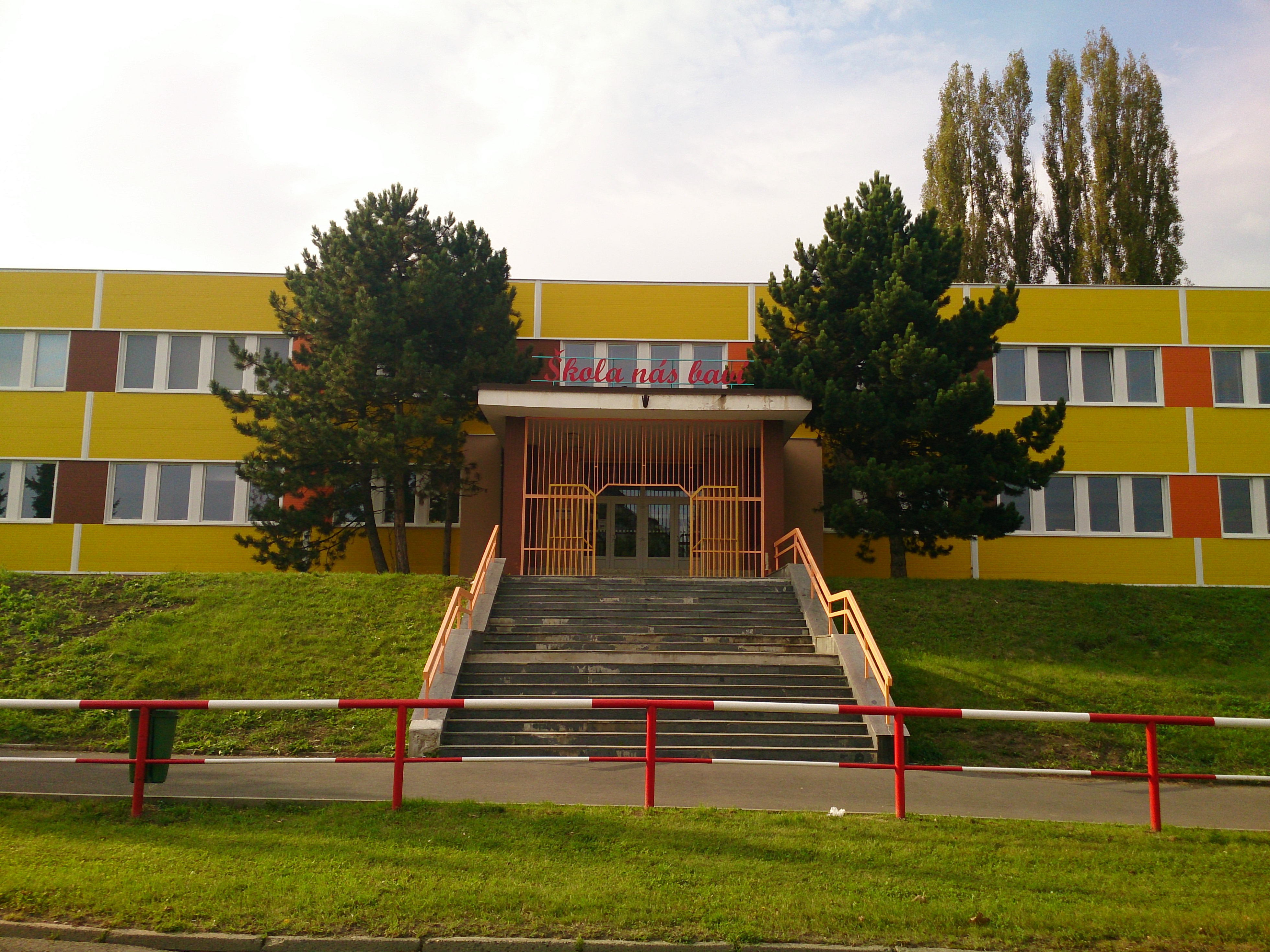 Teplická čtvrť Prosetice, převážně panelové sídliště na místě stržené bývalé zástavby... tamnější domy trpěly absencí kanalizace, špatnou statikou a vlhkostí (mnoho jich sdíleno zadní části s přilehlým skalním masivem).